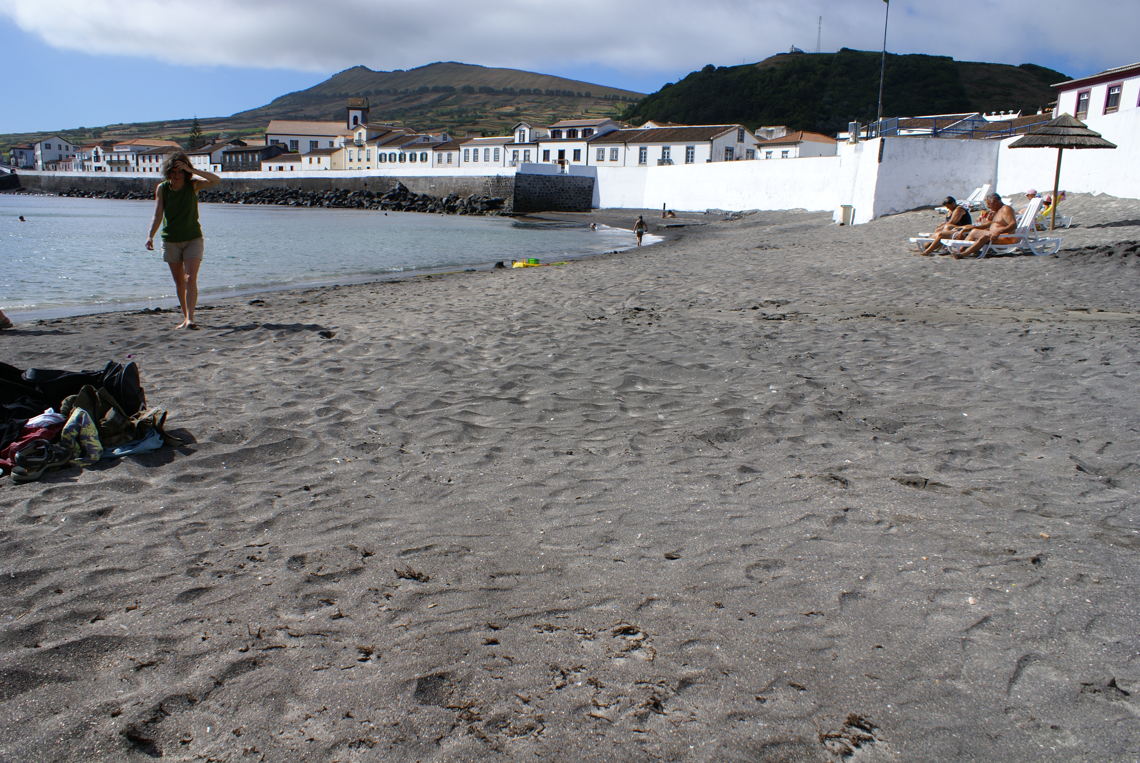 Praia de São Mateus, vista parcial, ilha Graciosa, Açores, Portugal